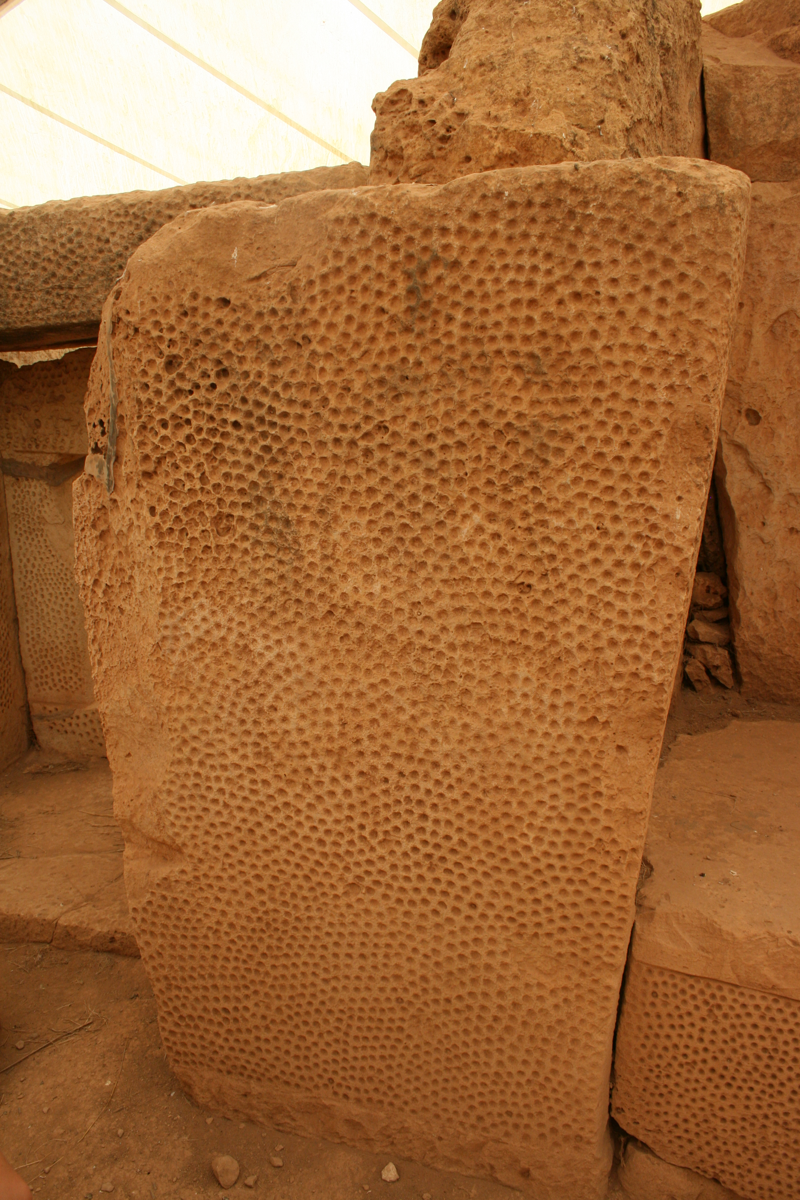 Bearbeiteter Kalkstein in Mnajdra